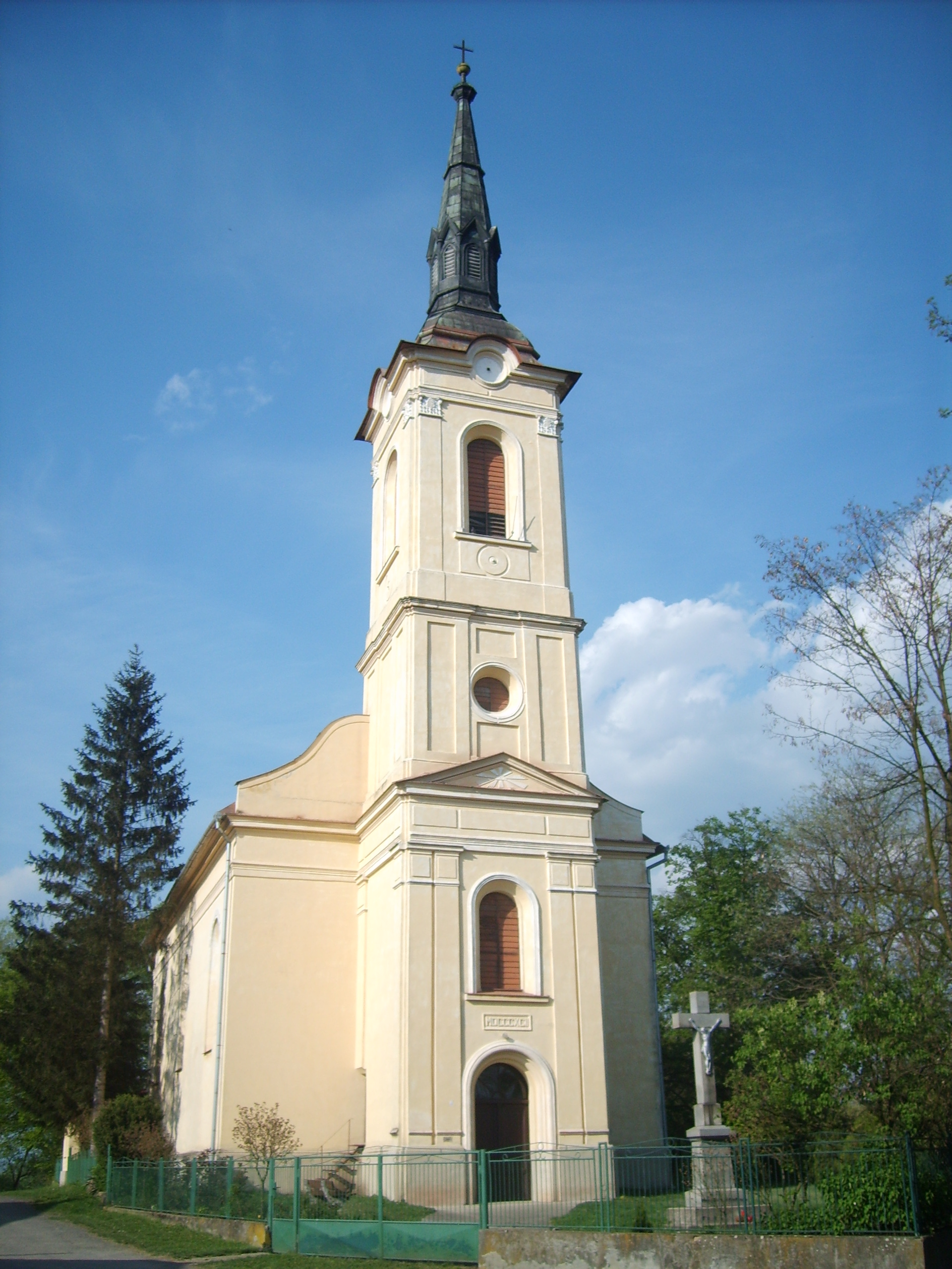 Római katolikus templom Velkenyén.